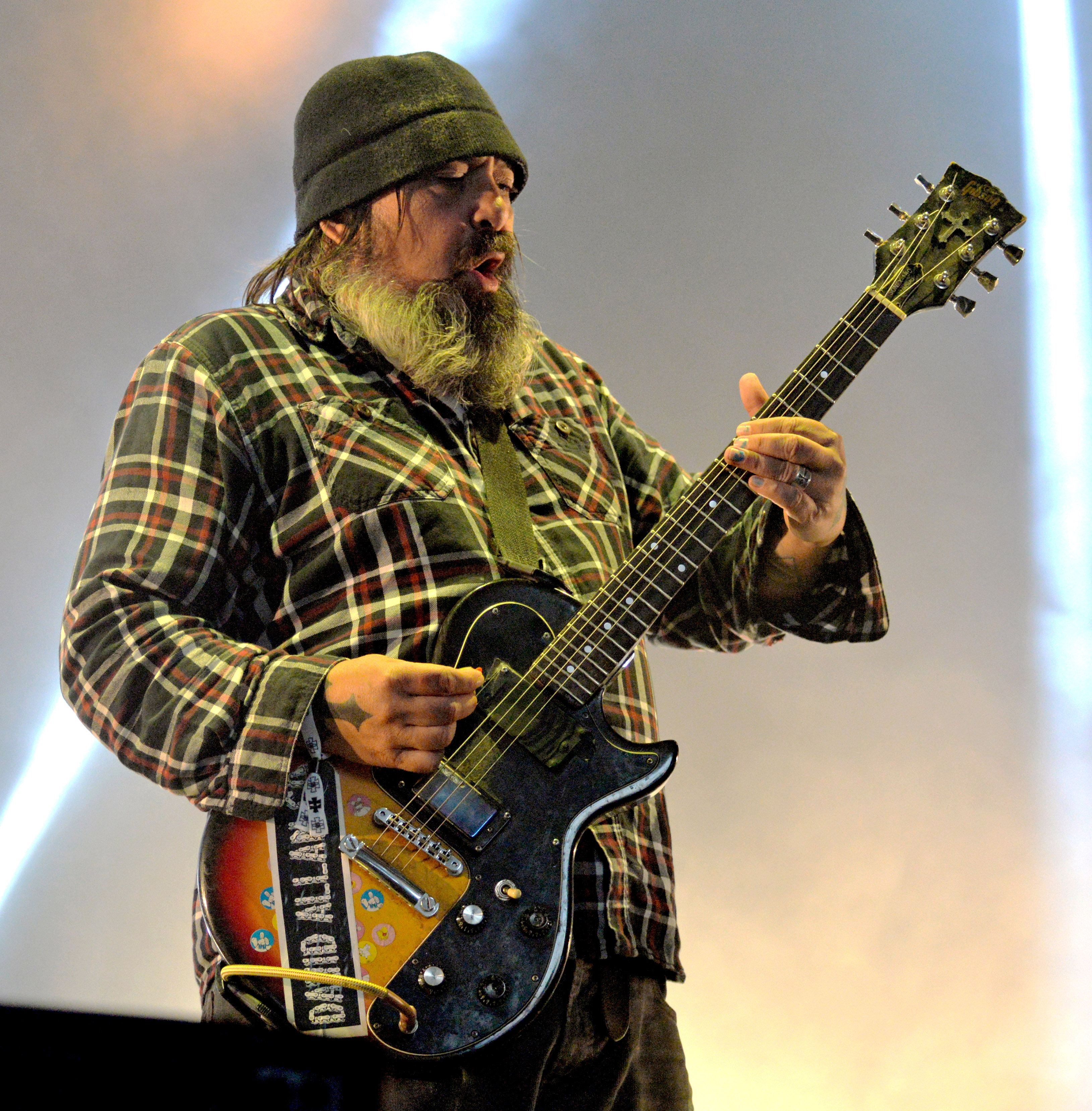 Concert du groupe américain EyeHateGod, Hellfest 2018.